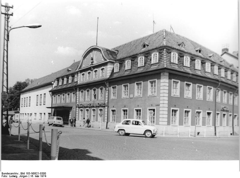 Gotha, "Volkshaus zum Mohren" ADN-ZB Ludwig 16.5.1974 Bez. Erfurt: Das "Volkshaus zum Mohren" ist eines der ältesten Gasthäuser Gothas und gehört zu den traditionsreichen Stätten der Arbeiterbewegung.